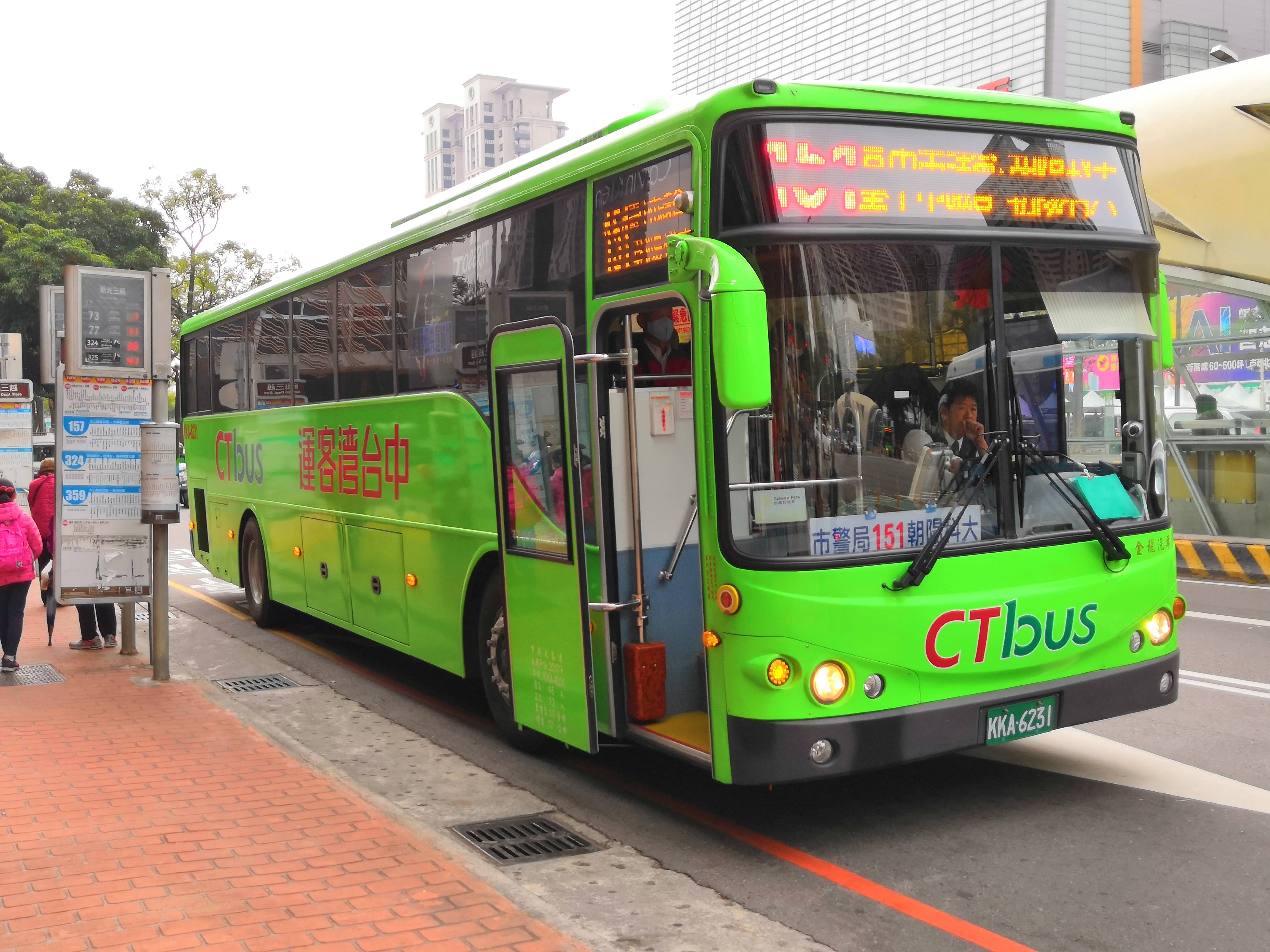 統聯客運台中市公車151路 金龍汽車製造KL6120UH3大客車 KKA6231